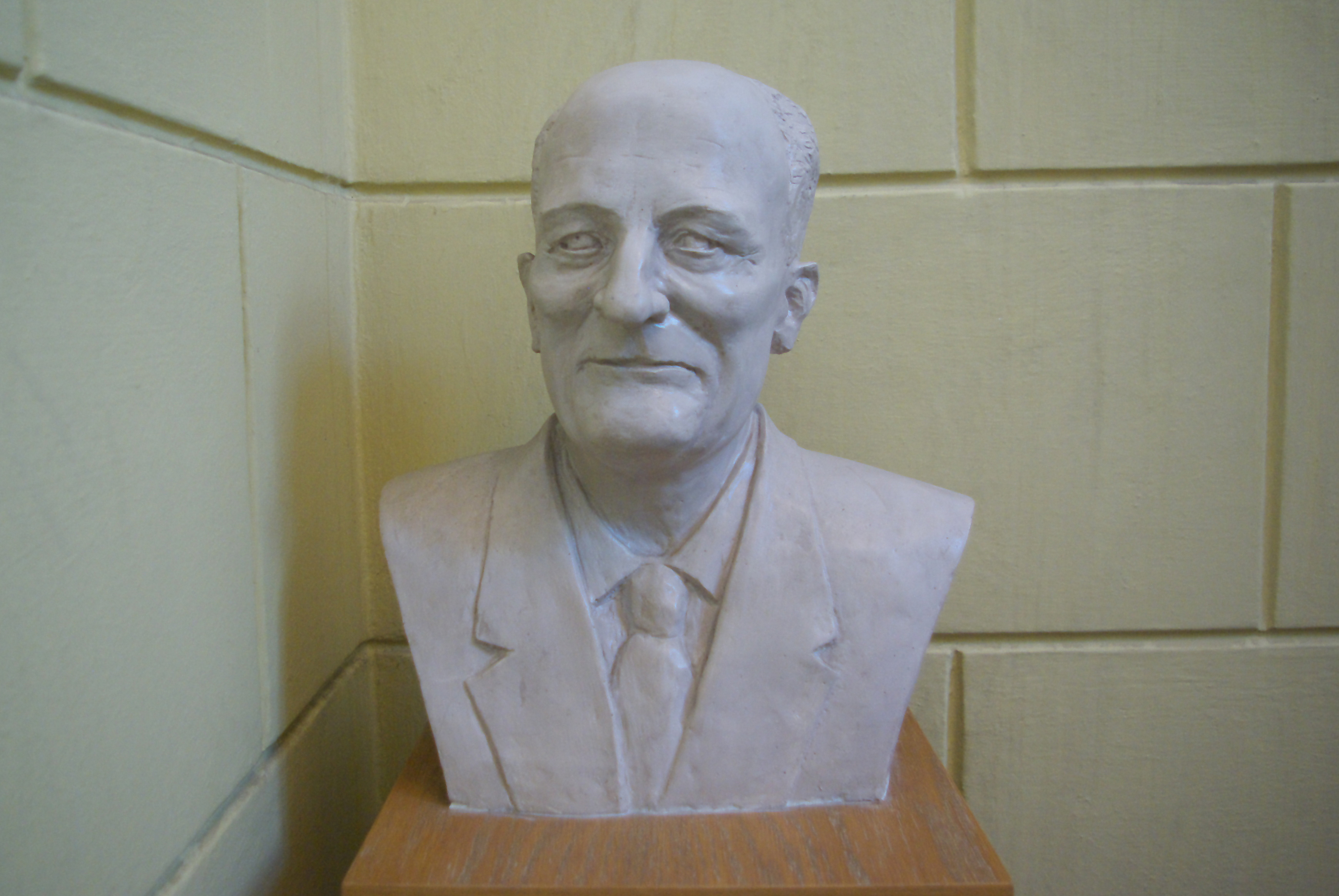 Popiersie Adama Fastnachta w Ratuszu w Sanoku przy ulicy Rynek 1